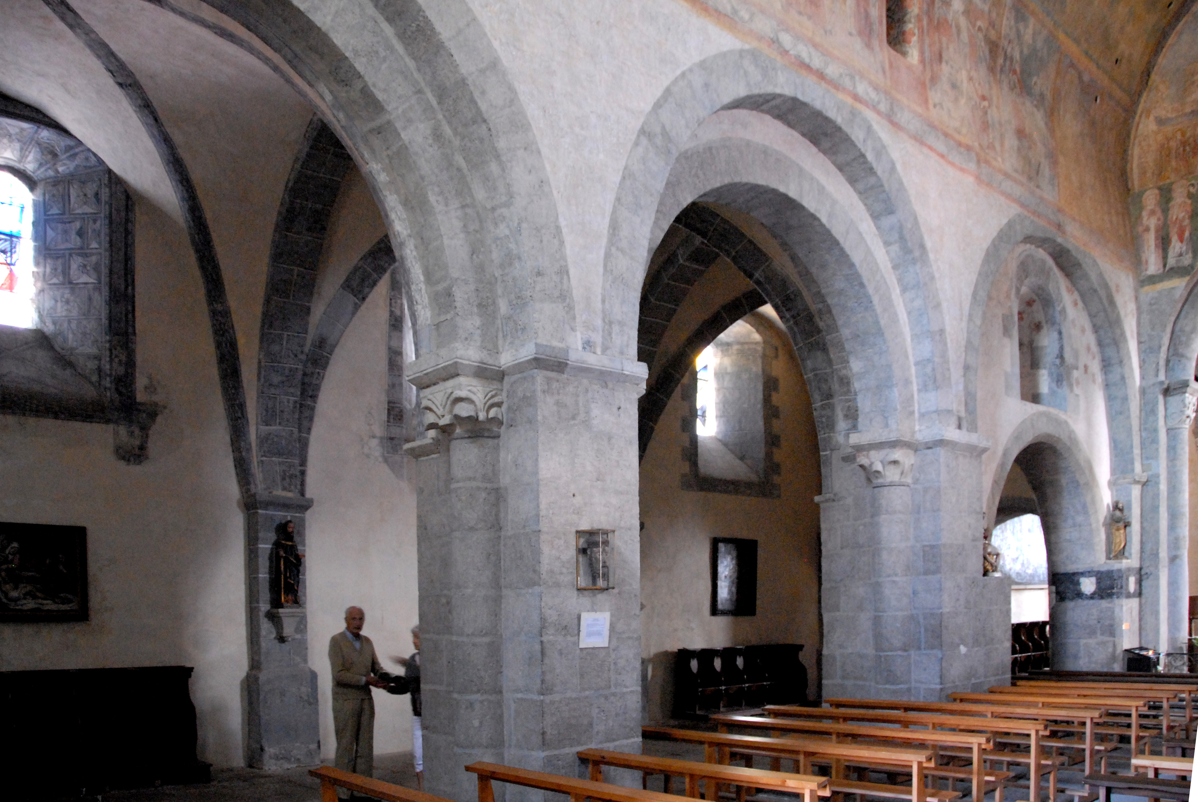 Abteikirche St.-André Lavaudieu, Hauptschiff, Nordwand u. Seitenschiff